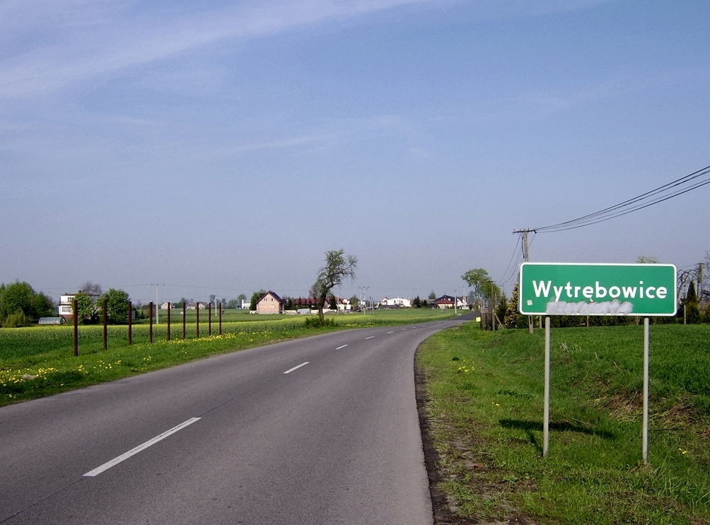 Wieś Turzno